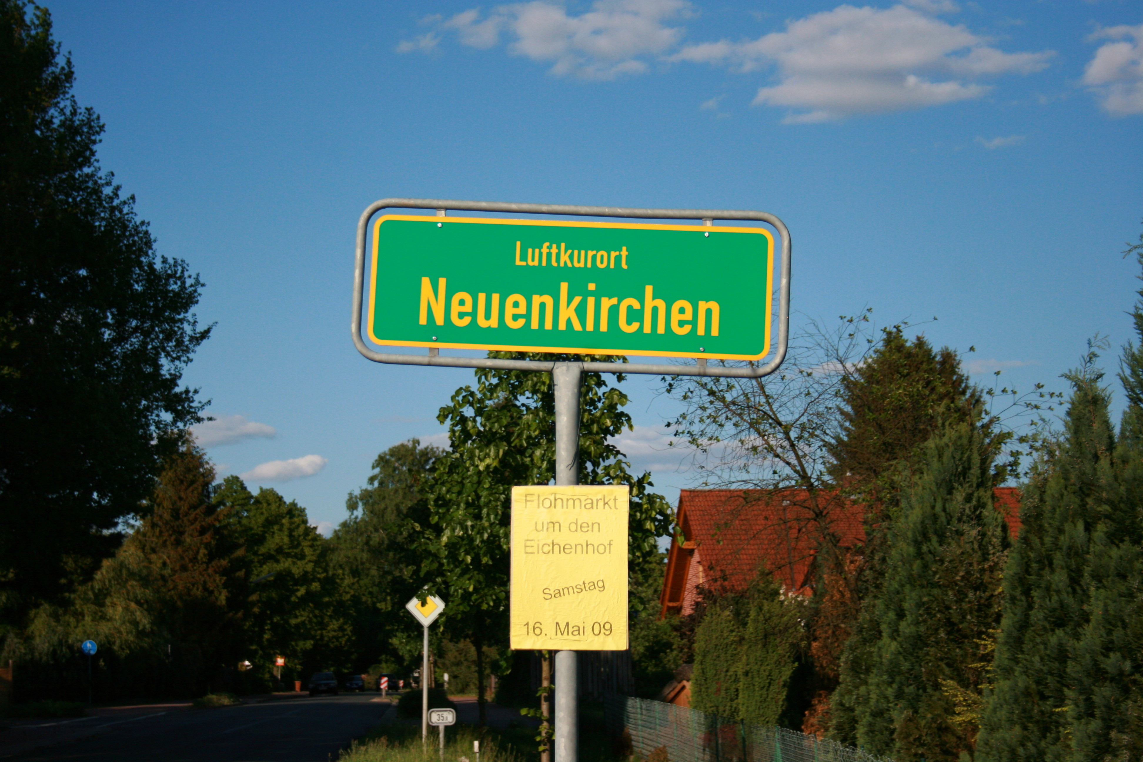 Visselhöveder Straße in Neuenkirchen (Lüneburger Heide)